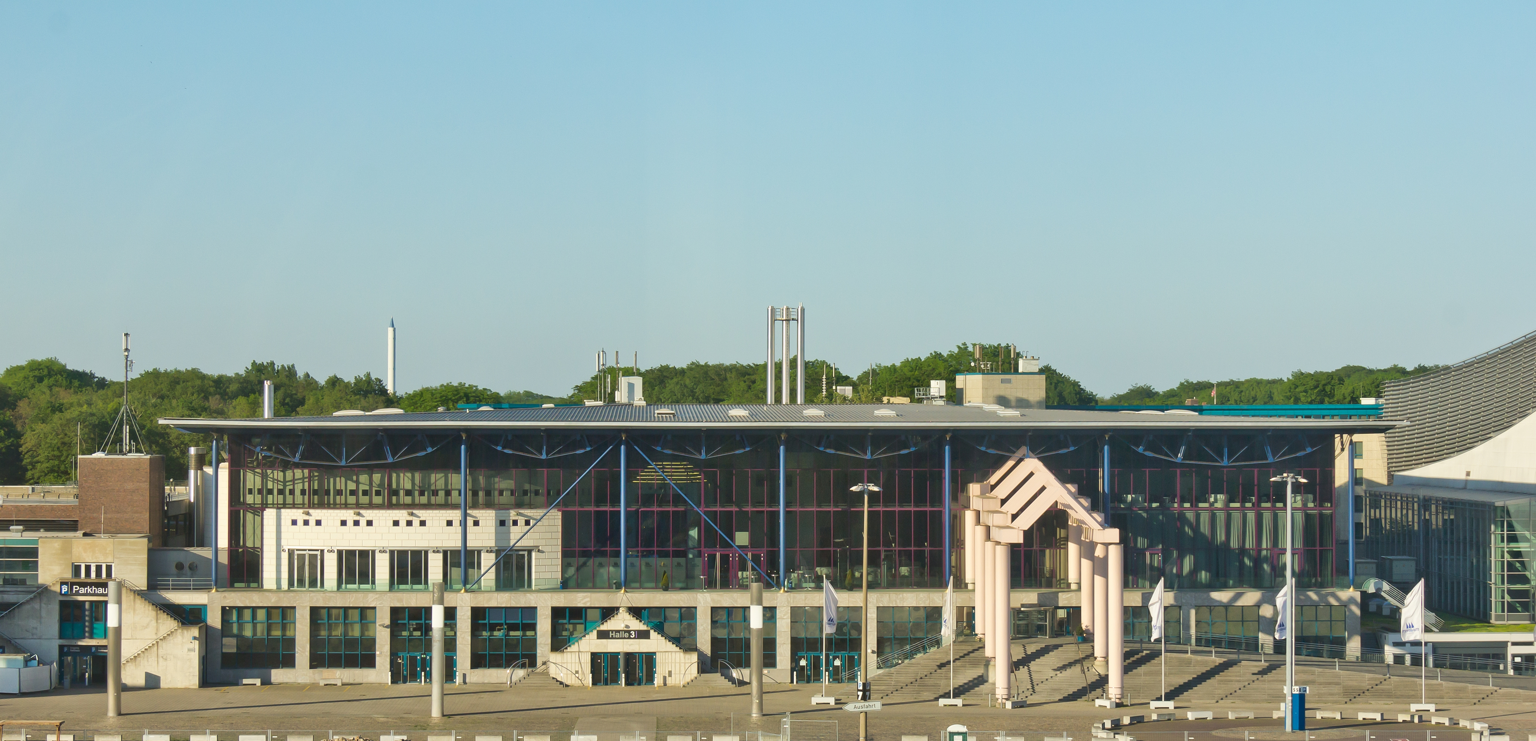 Messe Centrum Bremen - Congress Centrum - Halle 2+3